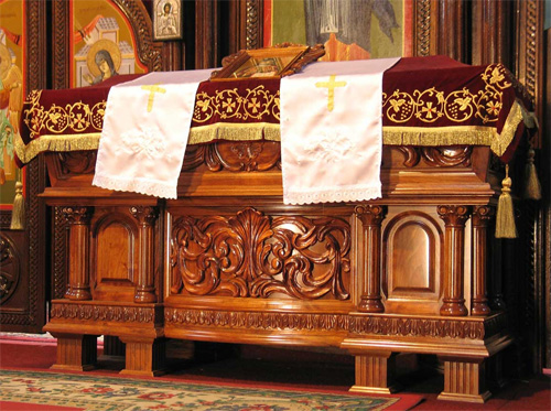 autor Кивот са моштима св. свештеномученика Платона епископа бањалучког Налази се у Саборној цркви Свете Тројице у Бања Луци, РС, православна Епархија бањалучка